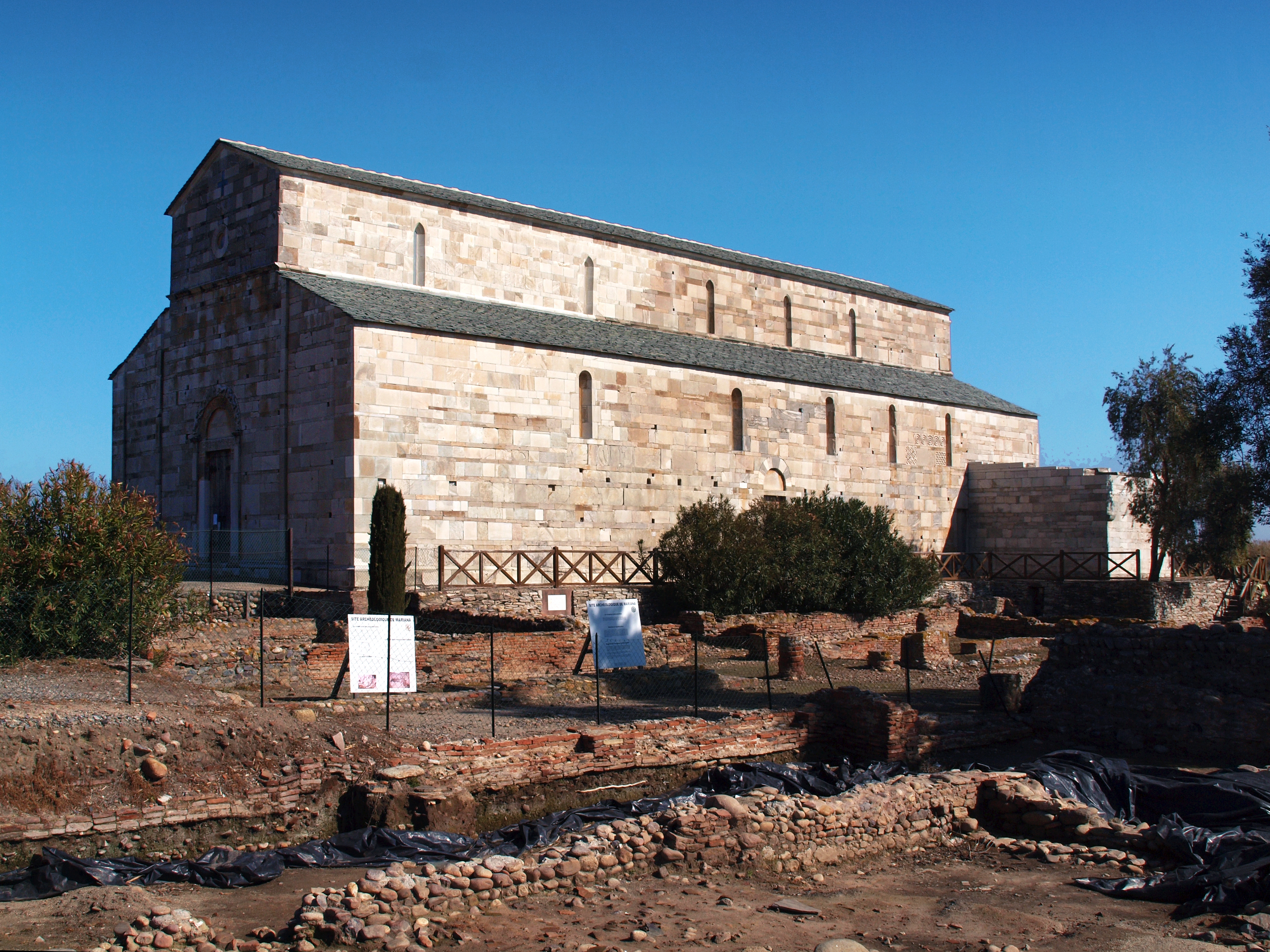 Lucciana, La Marana (Corse) - Cathédrale Santa-Maria-Assunta et le site archéologique de Mariana